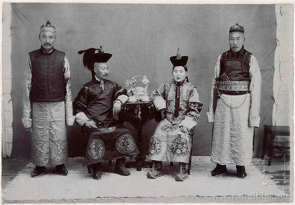 陶克陶胡与家人